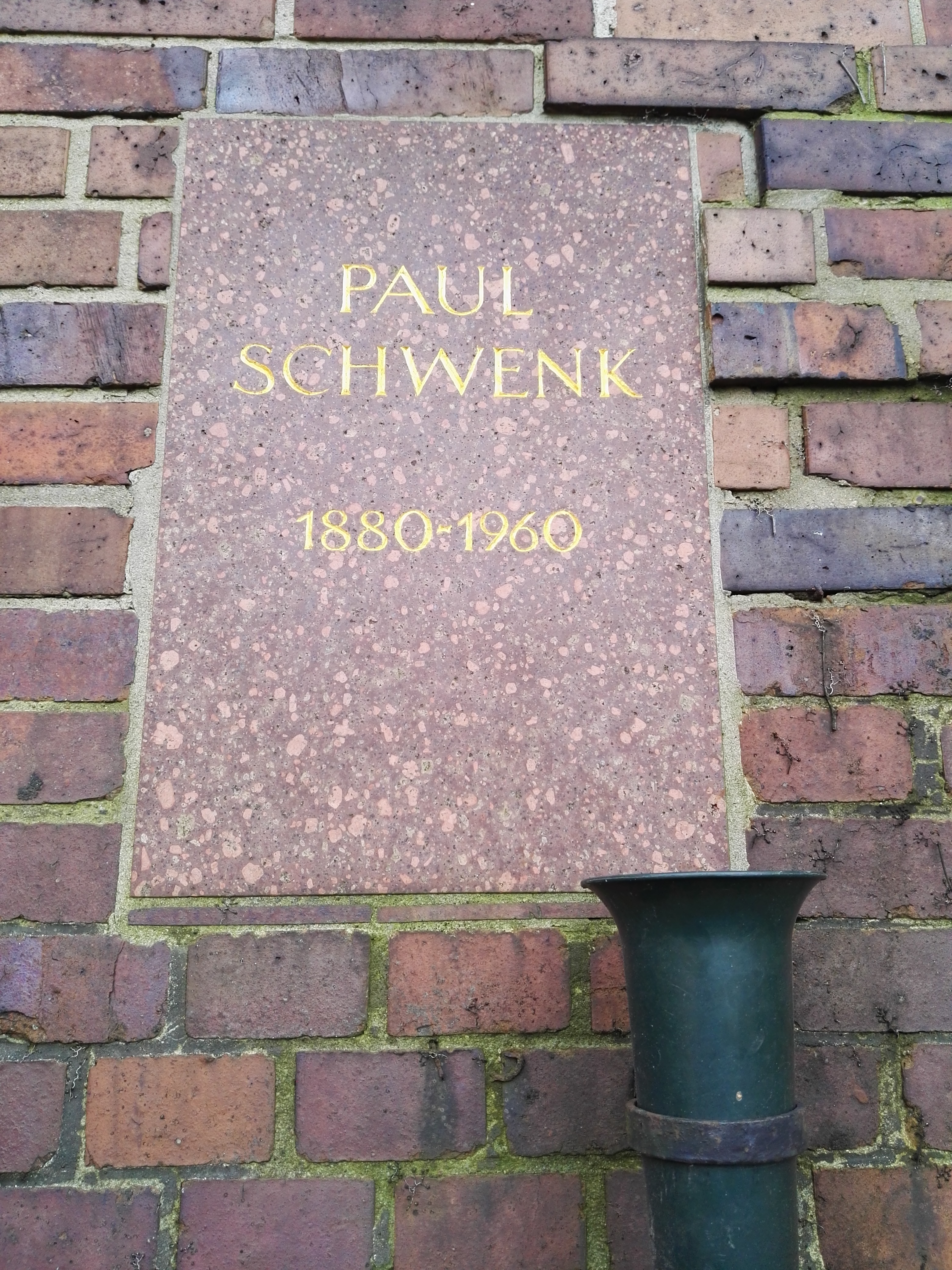 Grab von Paul Schwenk in der Gedenkstätte der Sozialisten auf dem Zentralfriedhof Friedrichsfelde in Berlin-Lichtenberg